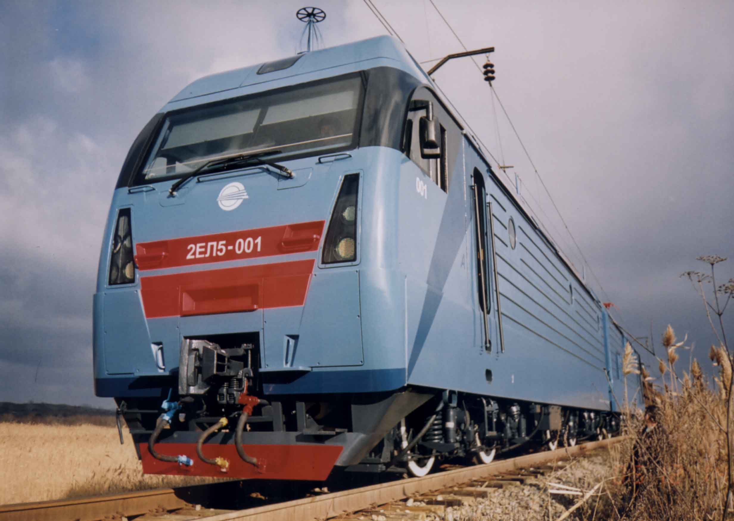 Электровоз 2ЭЛ5 - Внешний вид. Manufacturer Luhanskteplovoz, Ukraine